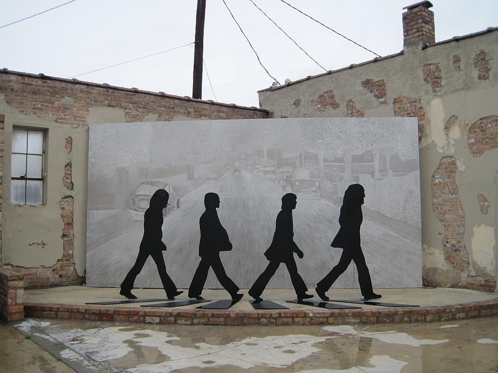 Beatles Park in Walnut Ridge, Arkansas